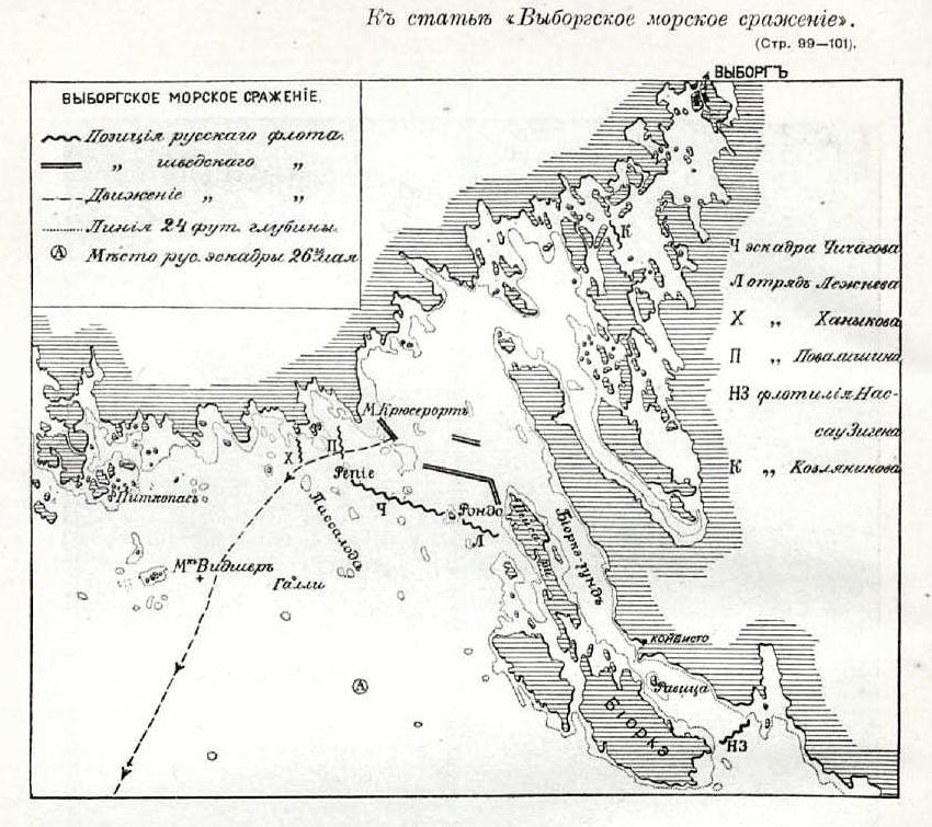 Данная картинка была использована в статье «Выборгское морское сражение» опубликованной в шестом томе «Военной энциклопедии», который был издан книгоиздательским товариществом Ивана Дмитриевича Сытина в 1912 году в столице Российской империи городе Санкт-Петербурге.